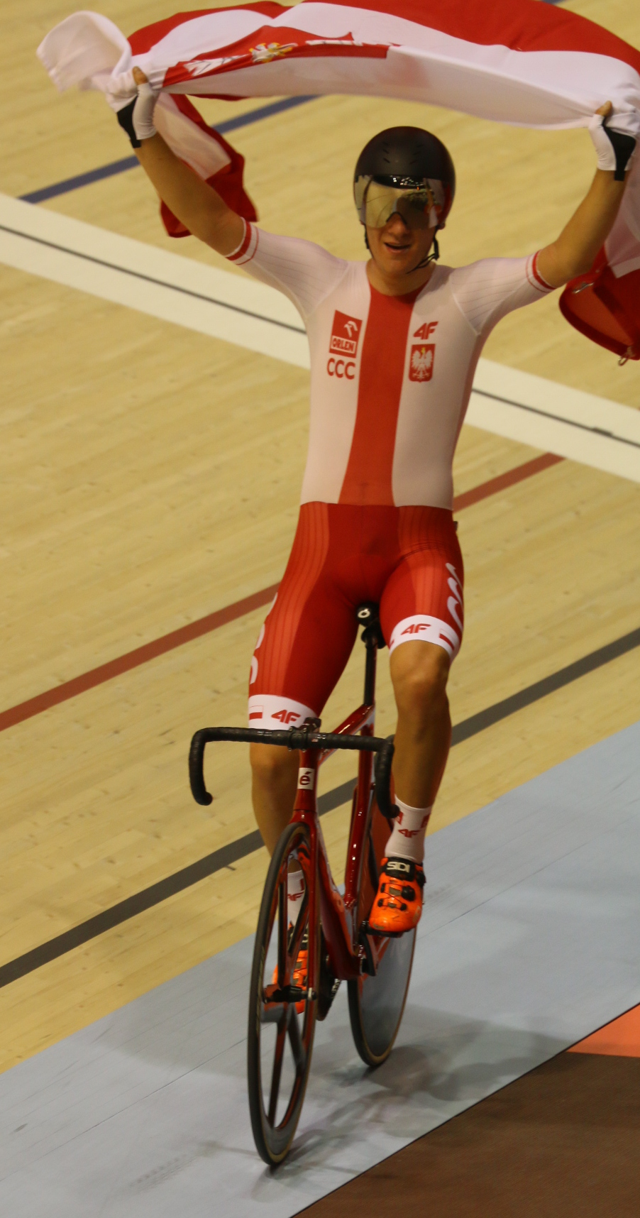 Alan Banaszek, polnischer Radsportler - Sieger im Punktefahren